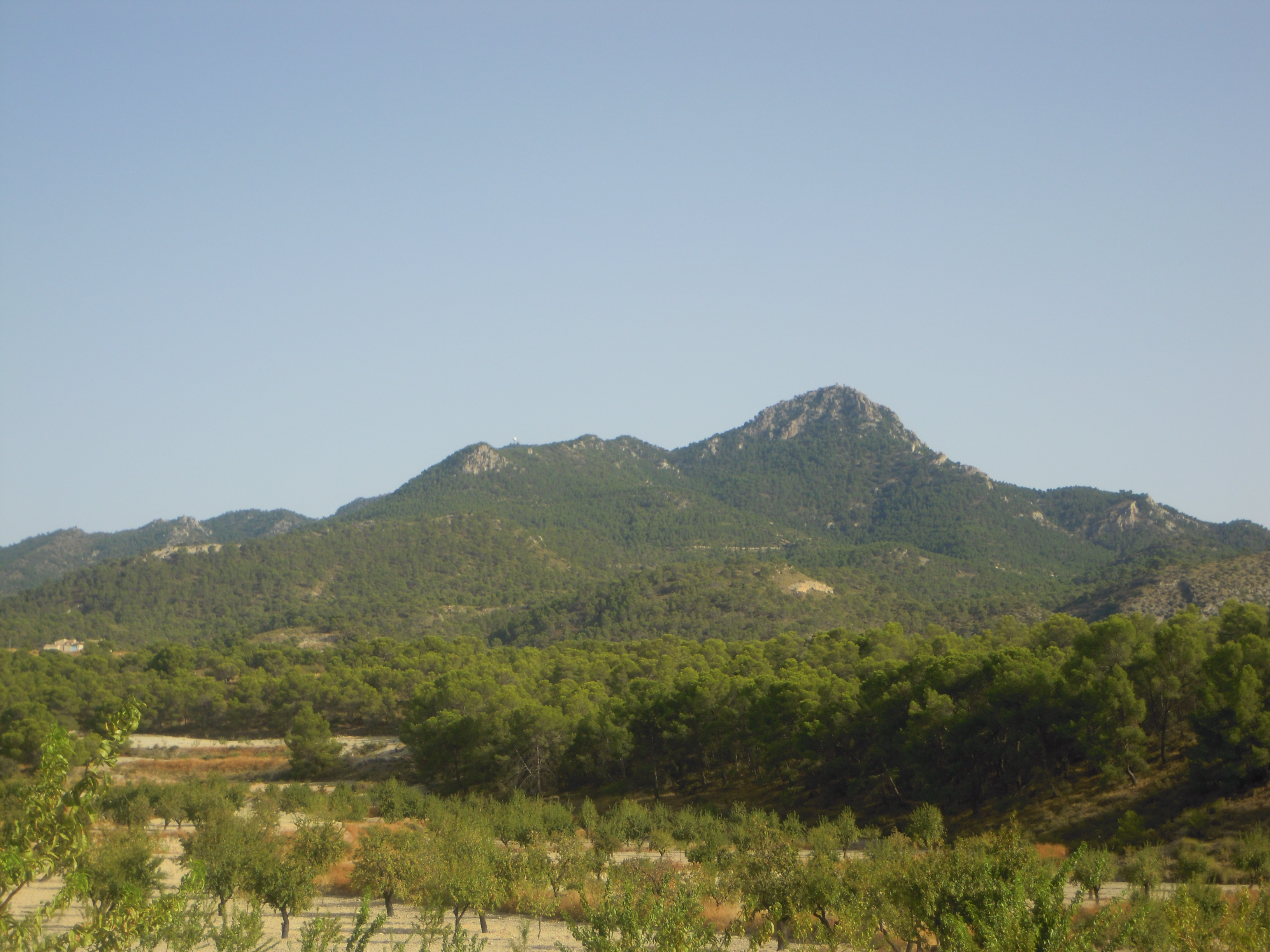 Sierra de La Pila This is a photography of a Special Area of Conservation in Spain with the ID: ES6200003. Natura2000 entry, EEA entry